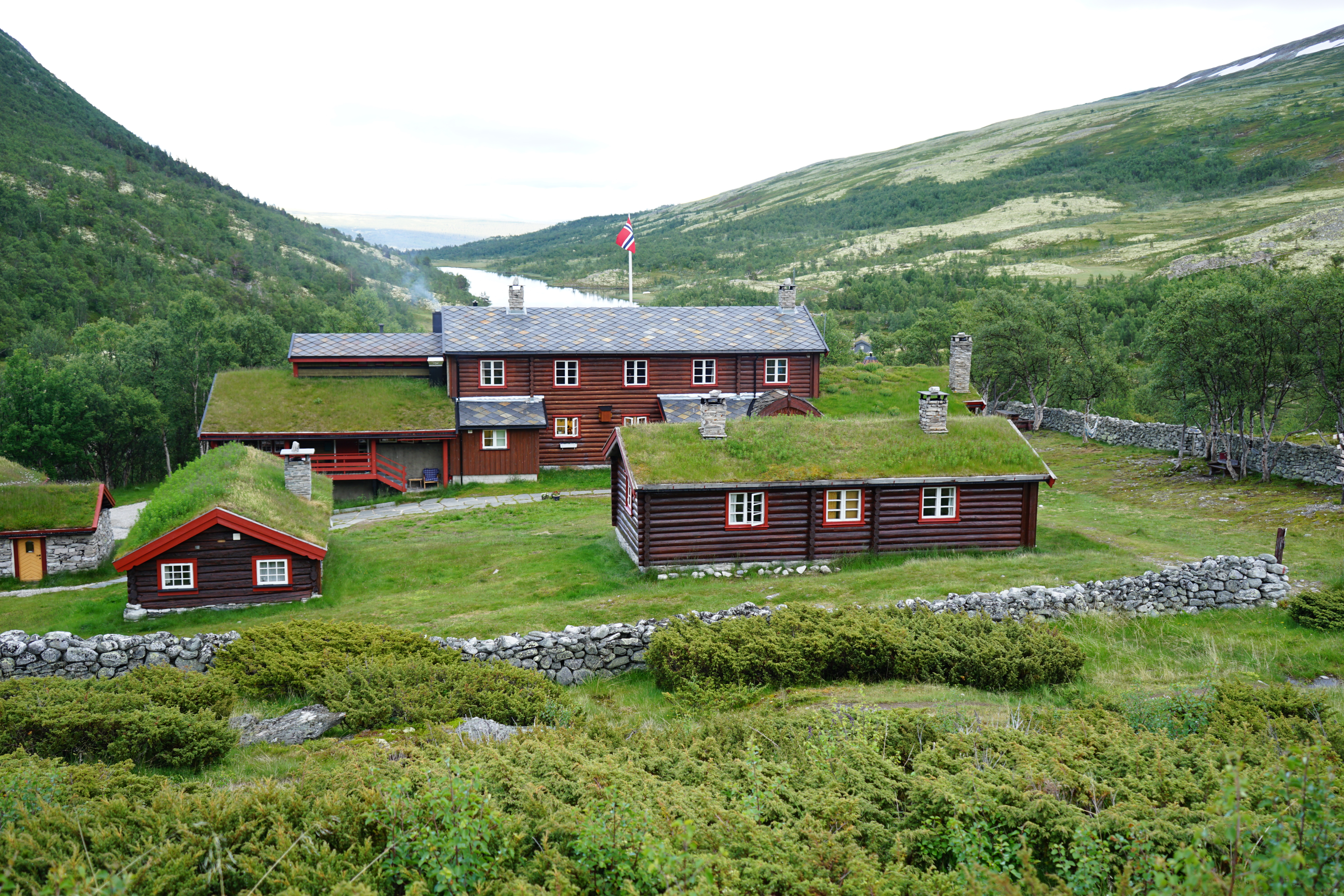 Bjørnhollia turisthytte